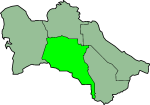 Acèh: Peuta Wilayah Ahal.